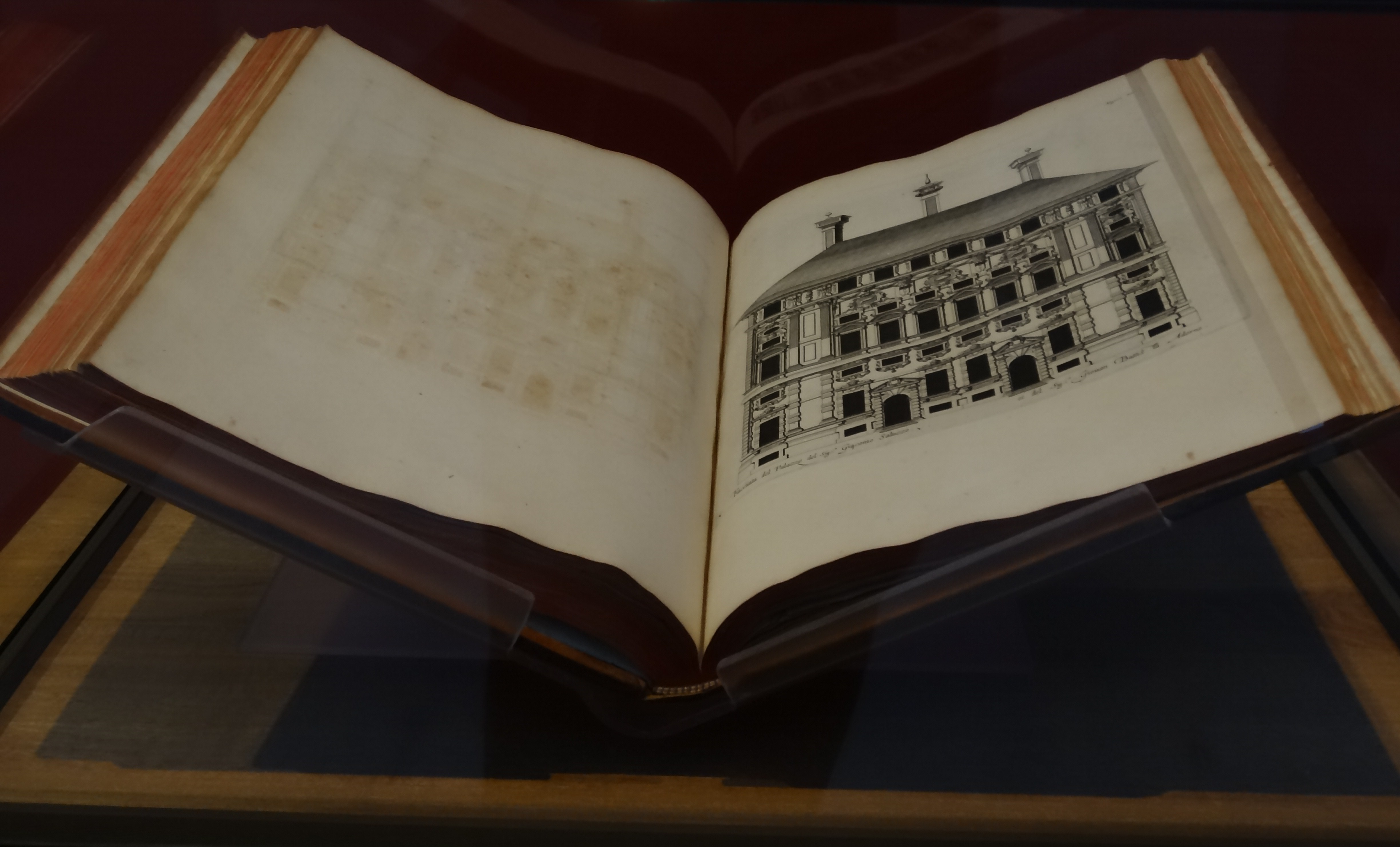 L'Europe de Rubens, Louvre-Lens, 22 May 2013-23 September 2013